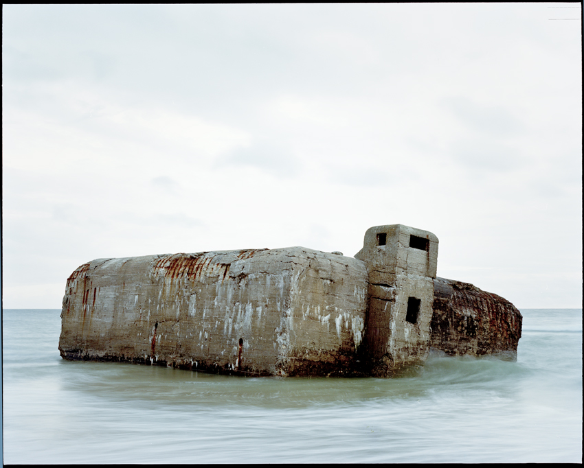 Vigsø bugt